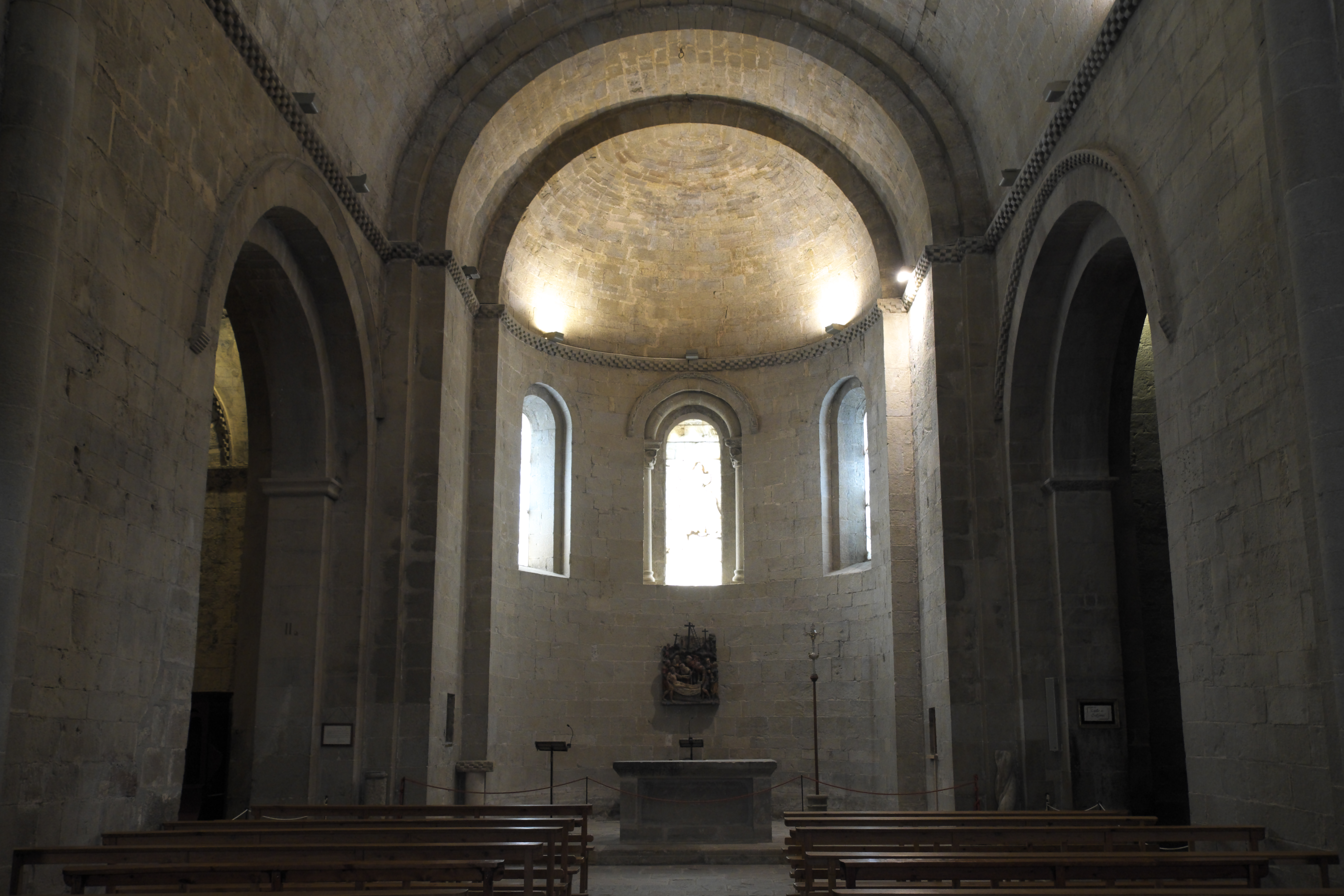 Pfarrkirche und ehemalige Klosterkirche Santa María in Santa Cruz de la Serós in der Provinz Huesca (Aragón/Spanien), Innenraum mit Blick zum Chor